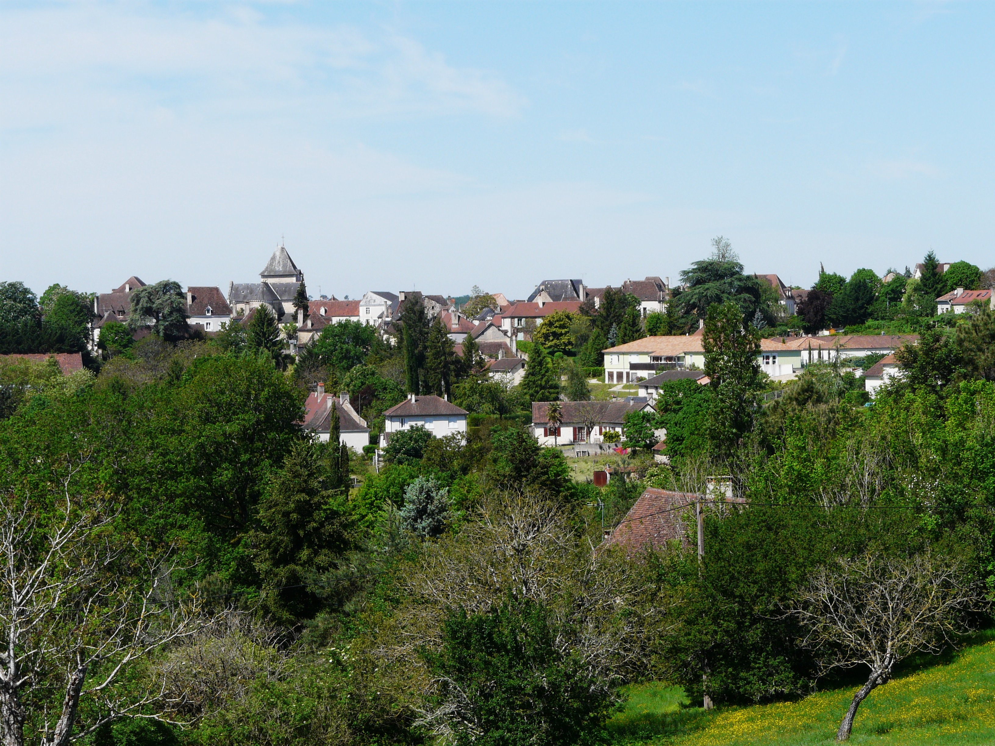 Le bourg de Thenon, Dordogne, France.